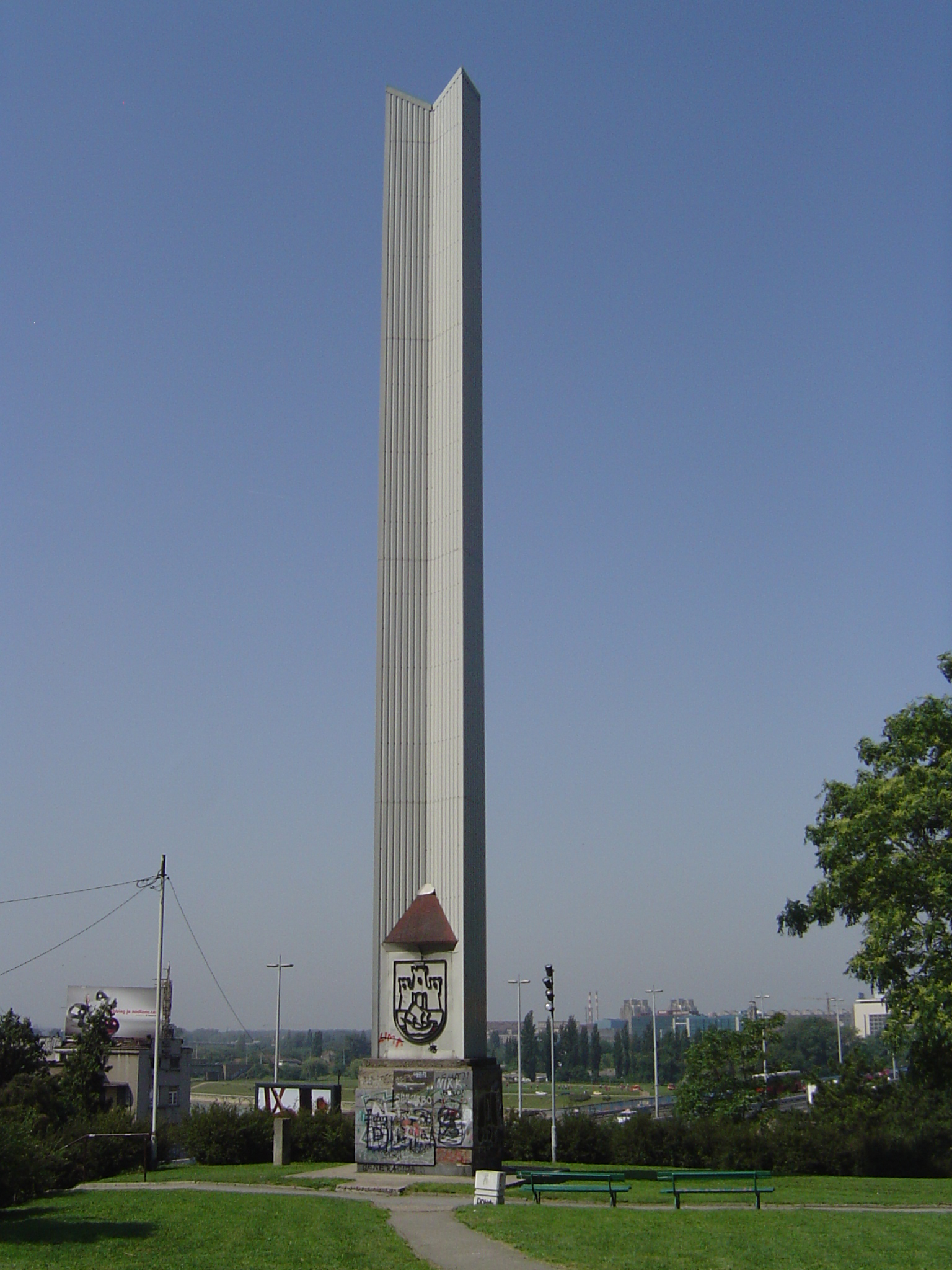 Обелиск подигнут у спомен прве конференције Покрета несврстаних земаља 1961. у Београду. У позадини се виде Бранков мост, река Сава и Нови Београд.